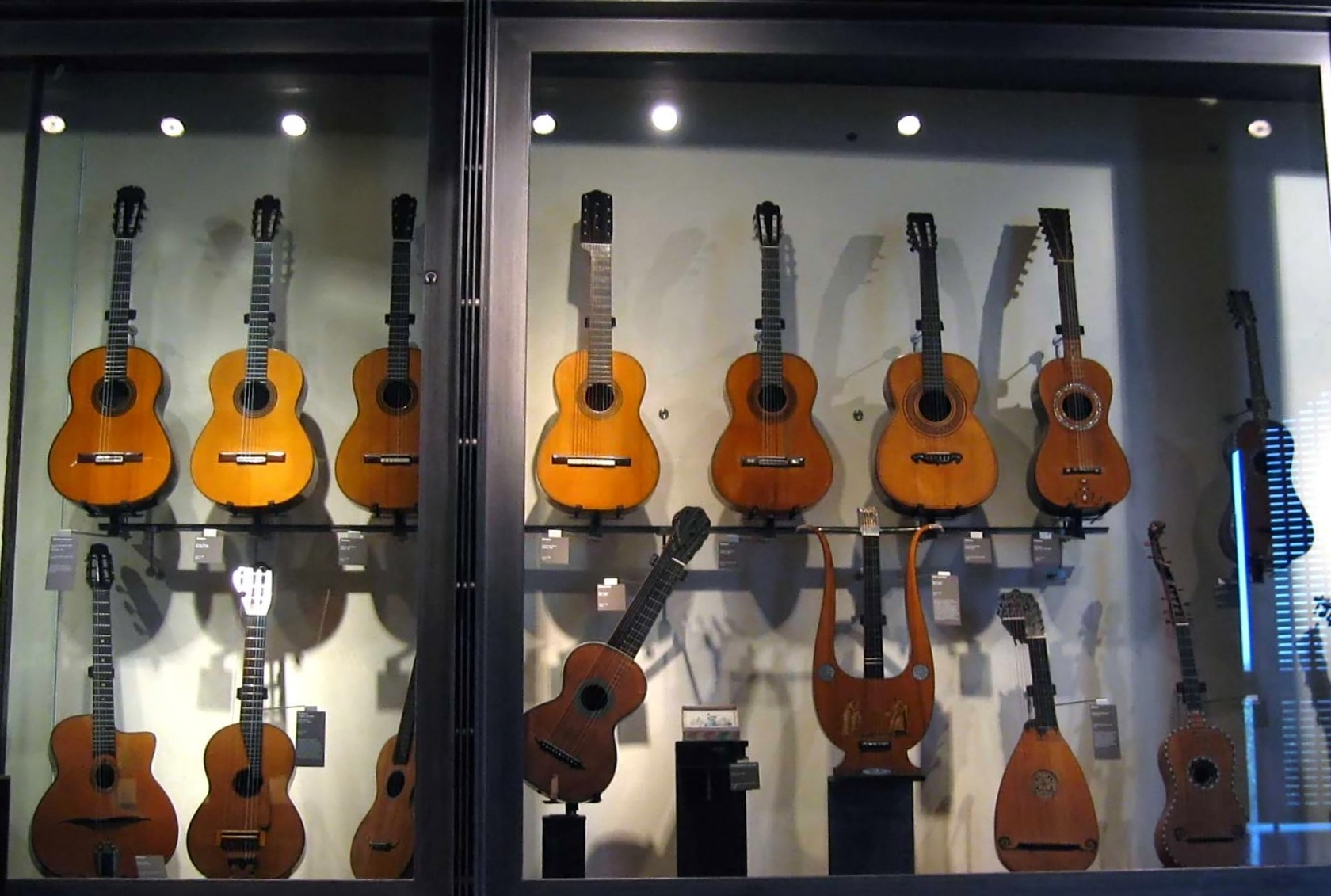 Description : Musee de la Musique de Paris Place : Parc de la Villette, Paris, France Date : juillet 2006 Auteur : Pline photo personnelle